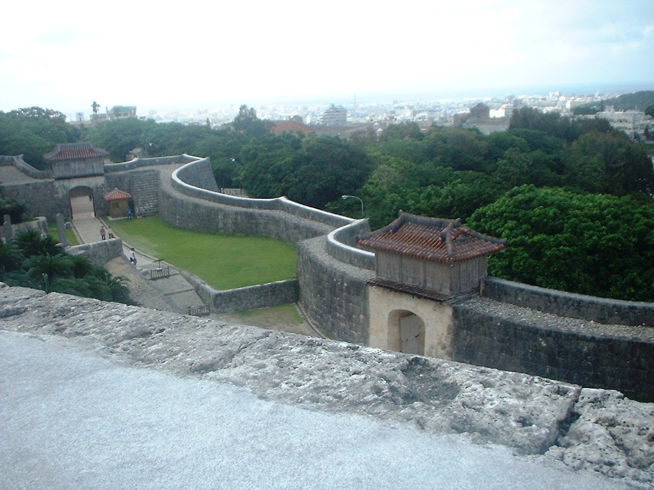 首里城内よりより市街を望む